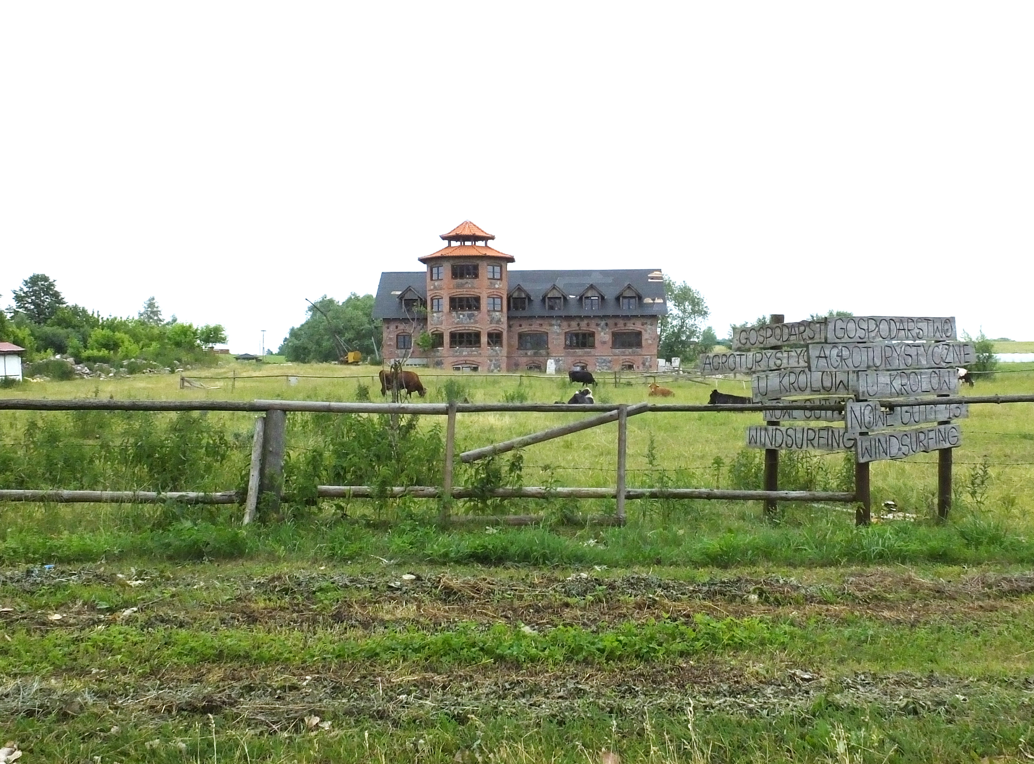 Gospodarstwo Agroturystyczne "U Królów", Nowe Guty nad Śniardwami